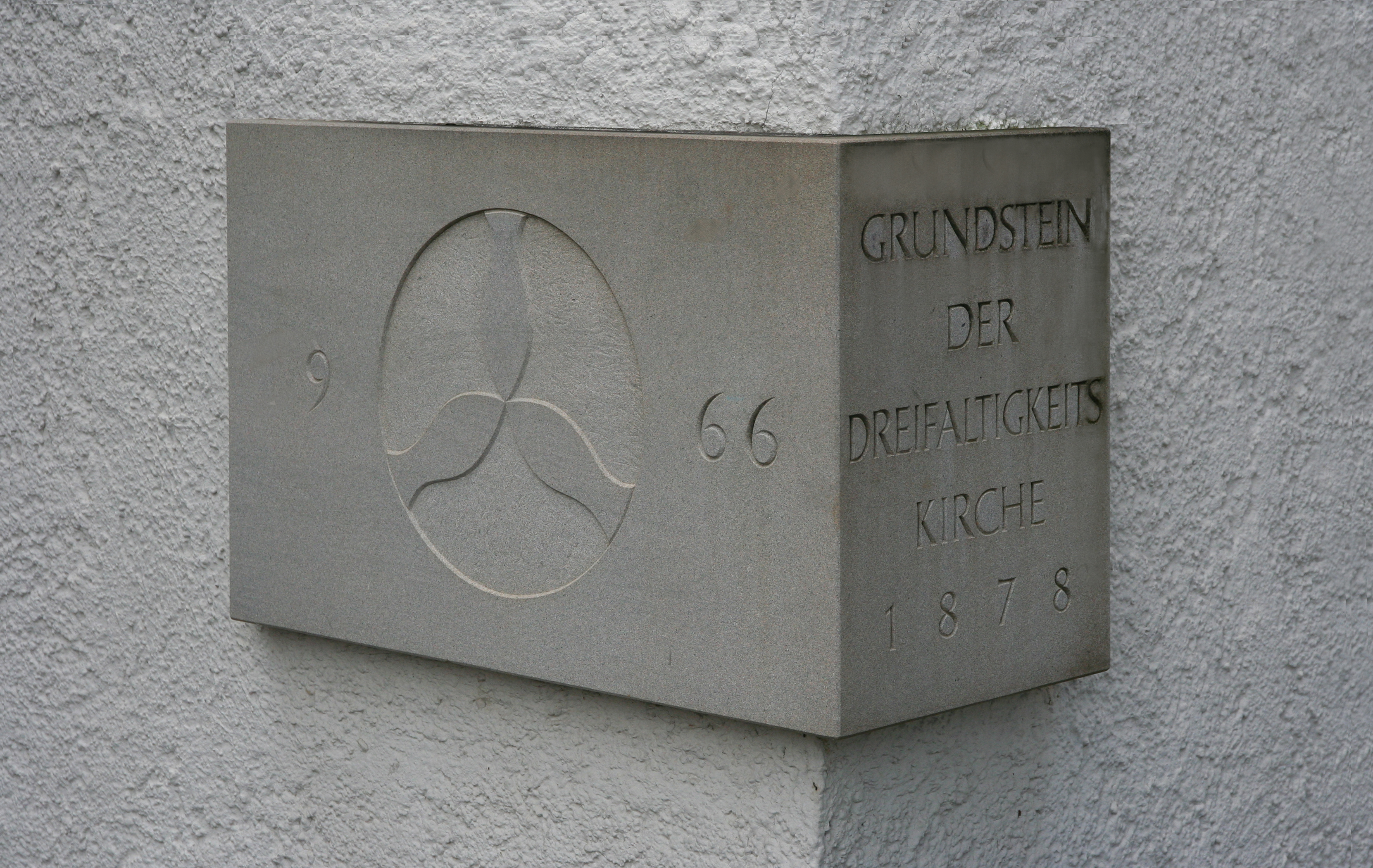 Römisch-katholische Pfarrkirche Dreifaltigkeit Rüti ZH, Grundstein